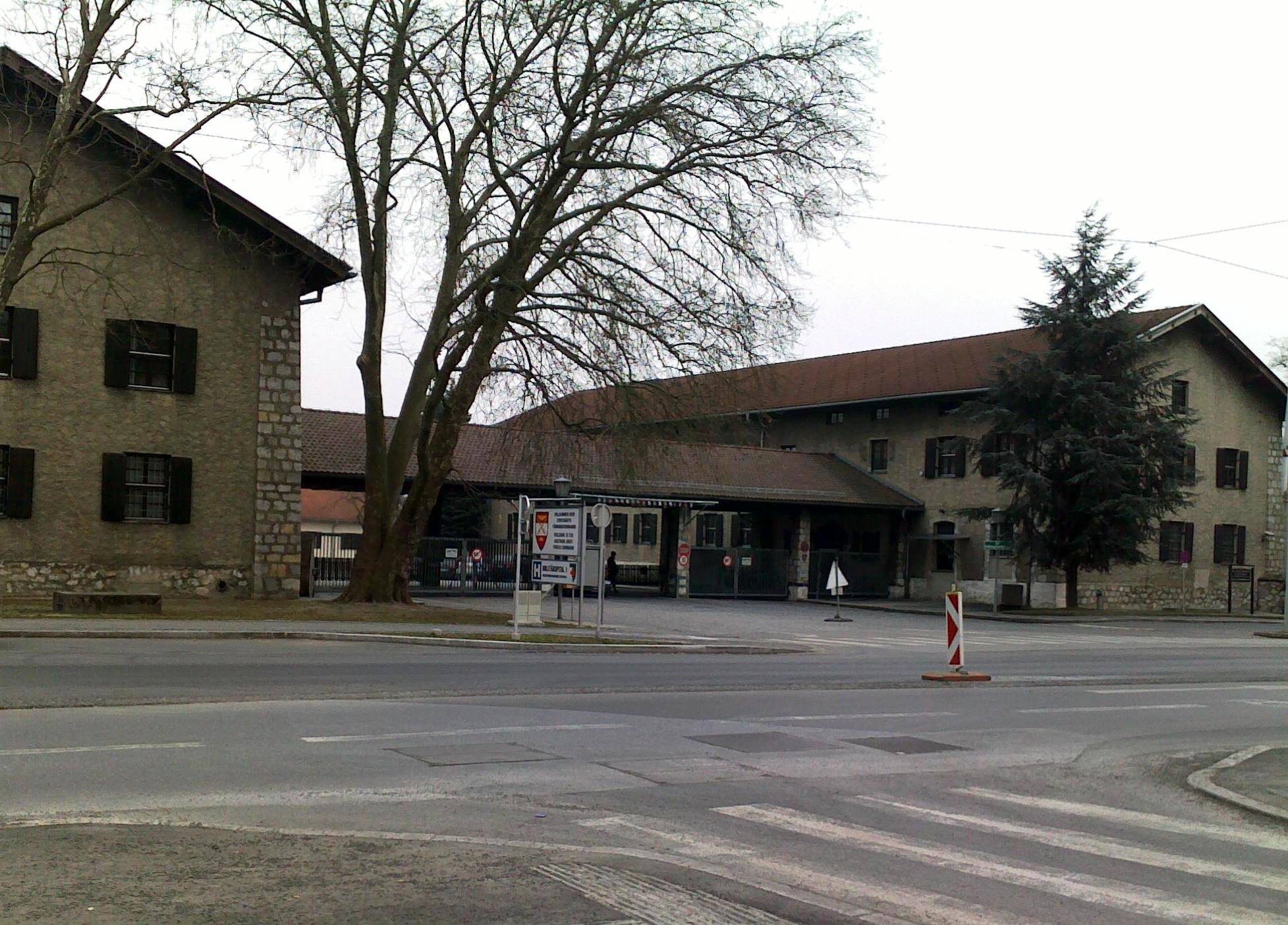 Belgierkaserne in Graz